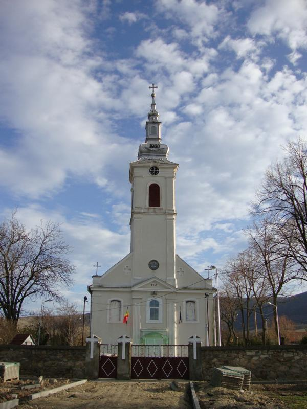 Biserica Ortodoxa din satul Galşa, com Şiria, judeţul Arad. Este biserica la care a funcţionat ca preot Traian Rusu Şirianu